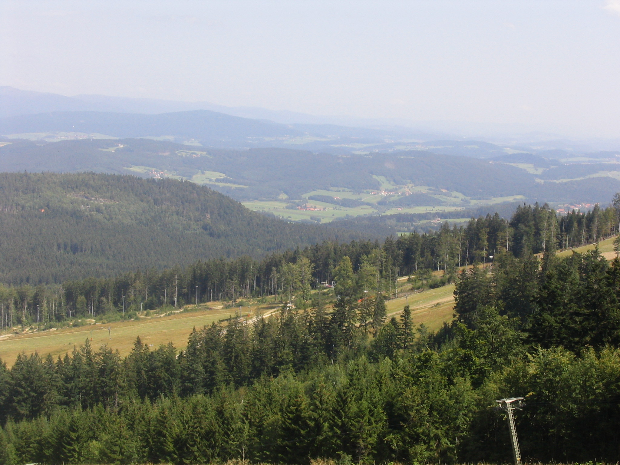 Blick vom Geißkopf Richtung Bischofsmais, aufgenommen am 02.08.2007 von Dr. Hagen Graebner